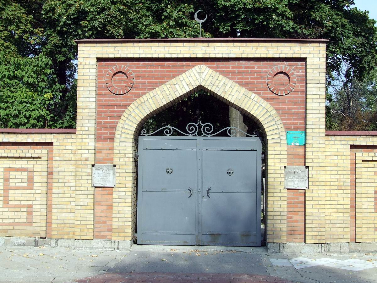 Muzułmański Cmentarz Tatarski na Powązkach